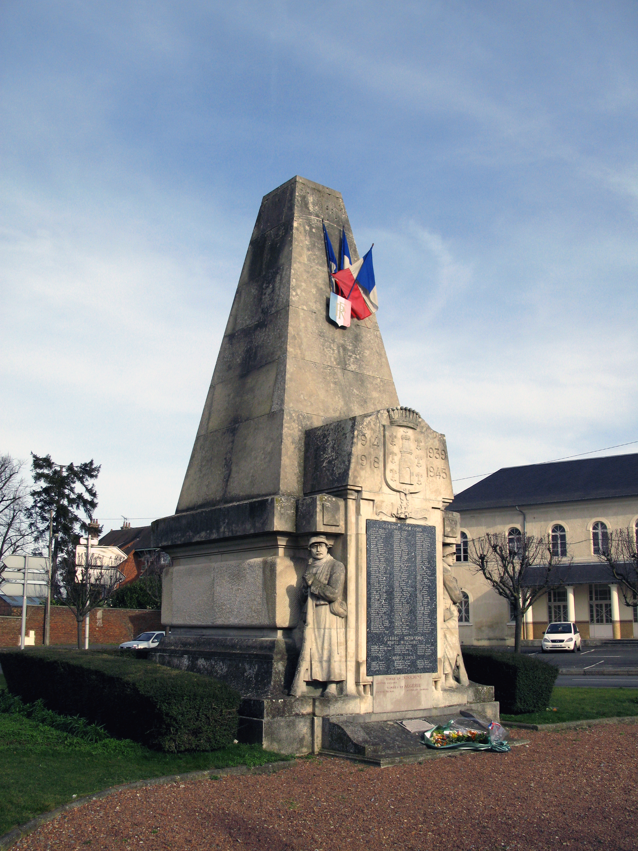 Montdidier (Somme, France) - Le Monument-aux-Morts. . .